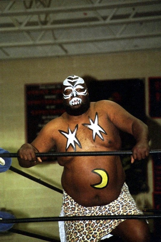 Wrestling legend Kamala on 3/28/09 from Franklin PA